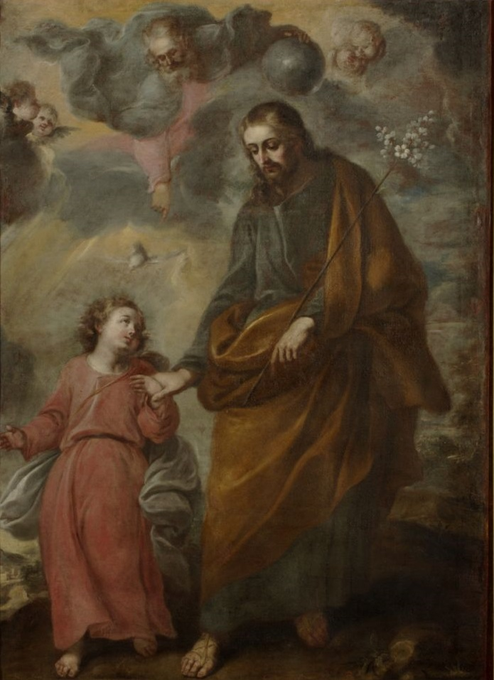 La obra representa a San José junto a su hijo, el Niño Jesús, .